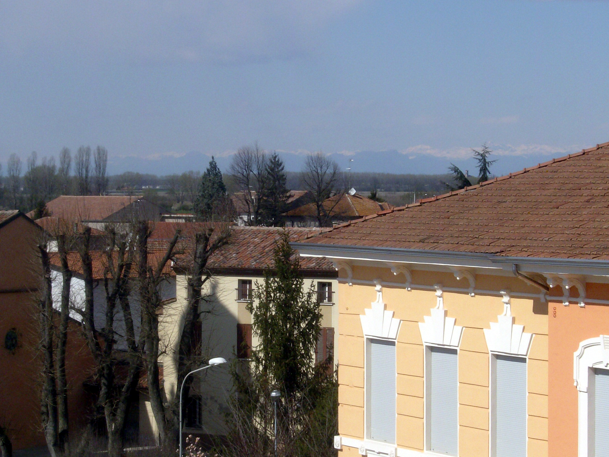 Il comune di Schivenoglia, sul fondo la montagna.